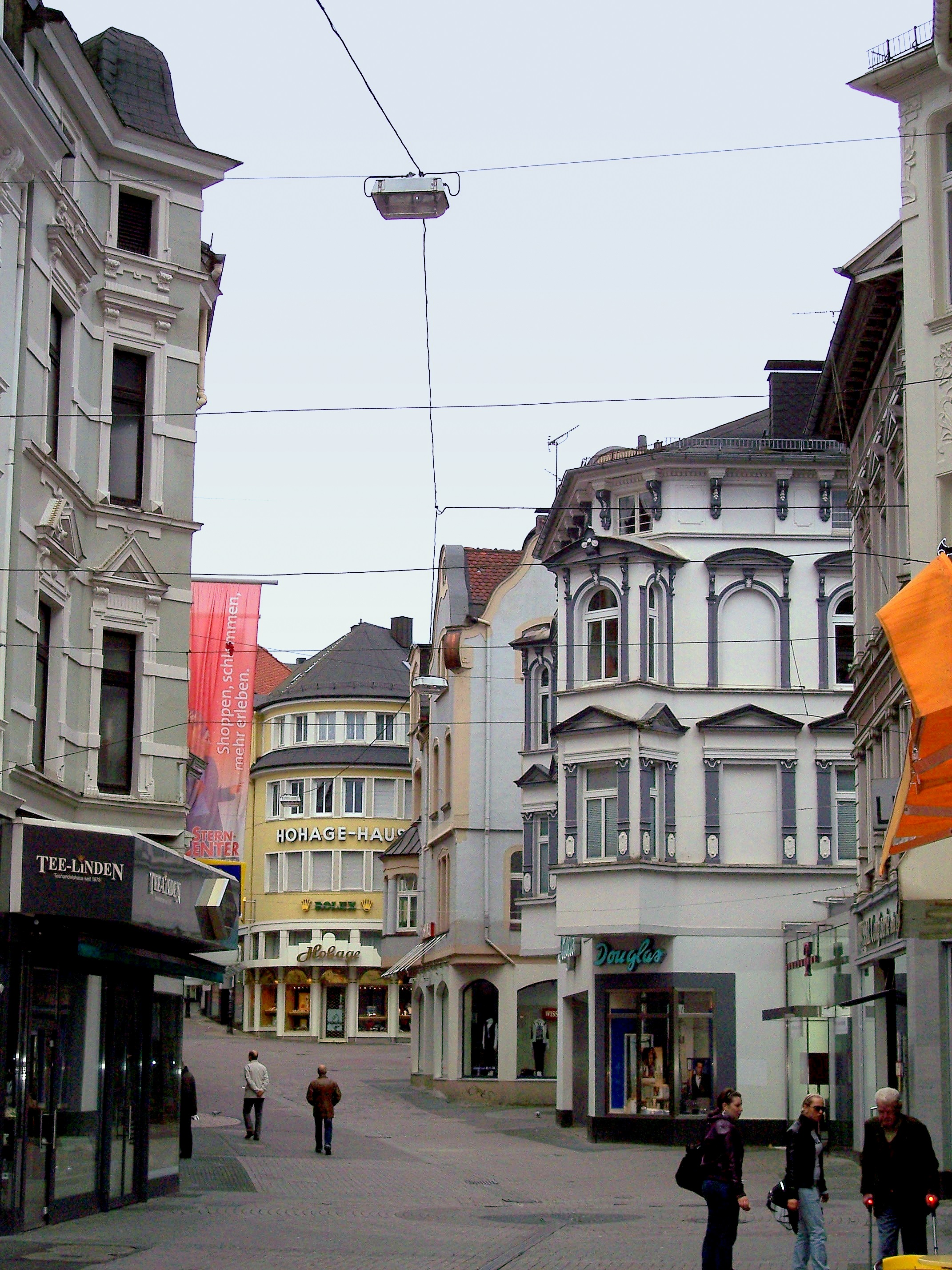 Lüdenscheid, Blick in die Fußgängerzone Wilhelmstraße